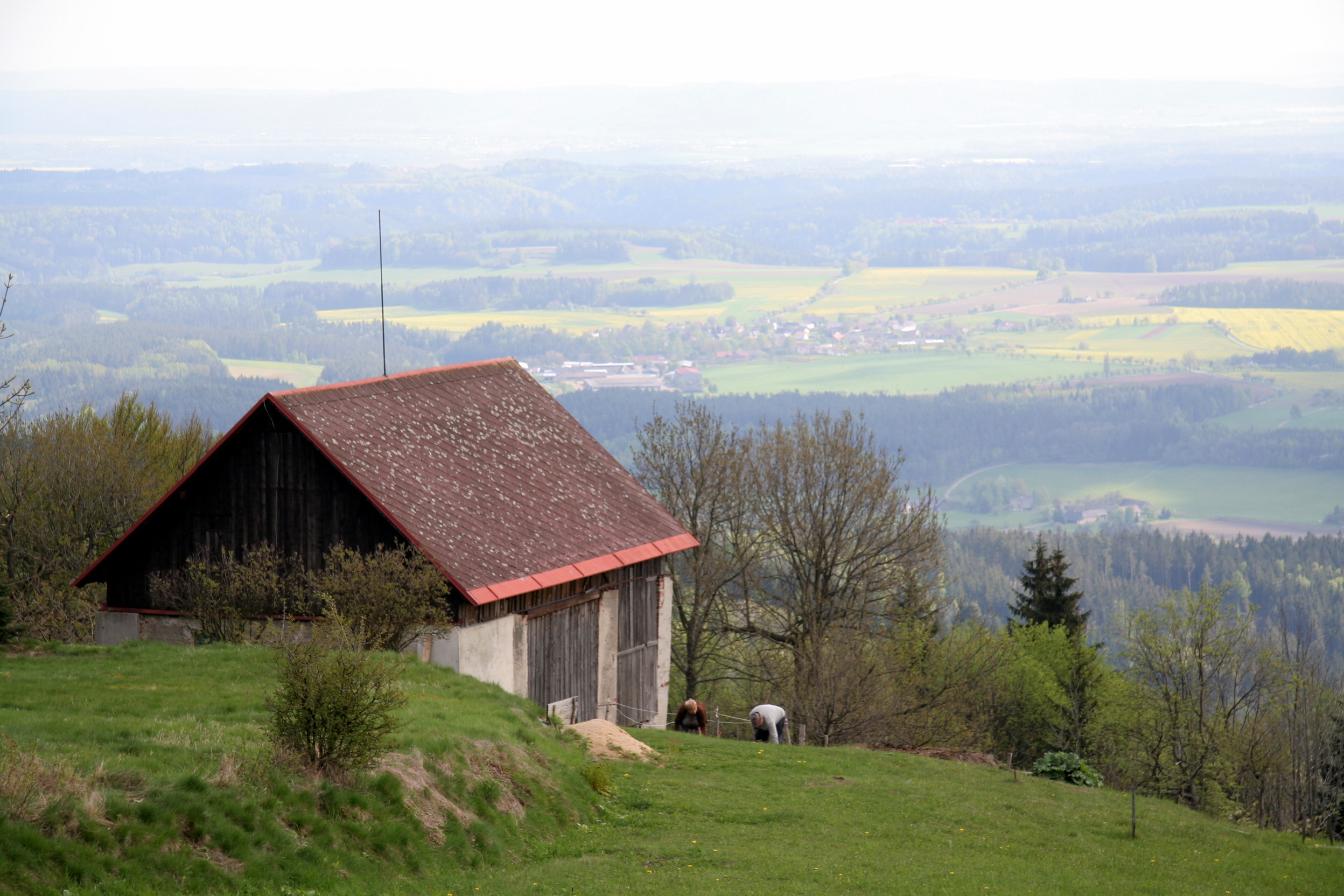 Blick ins Jeschkenvorland oberhalb von Proschitz